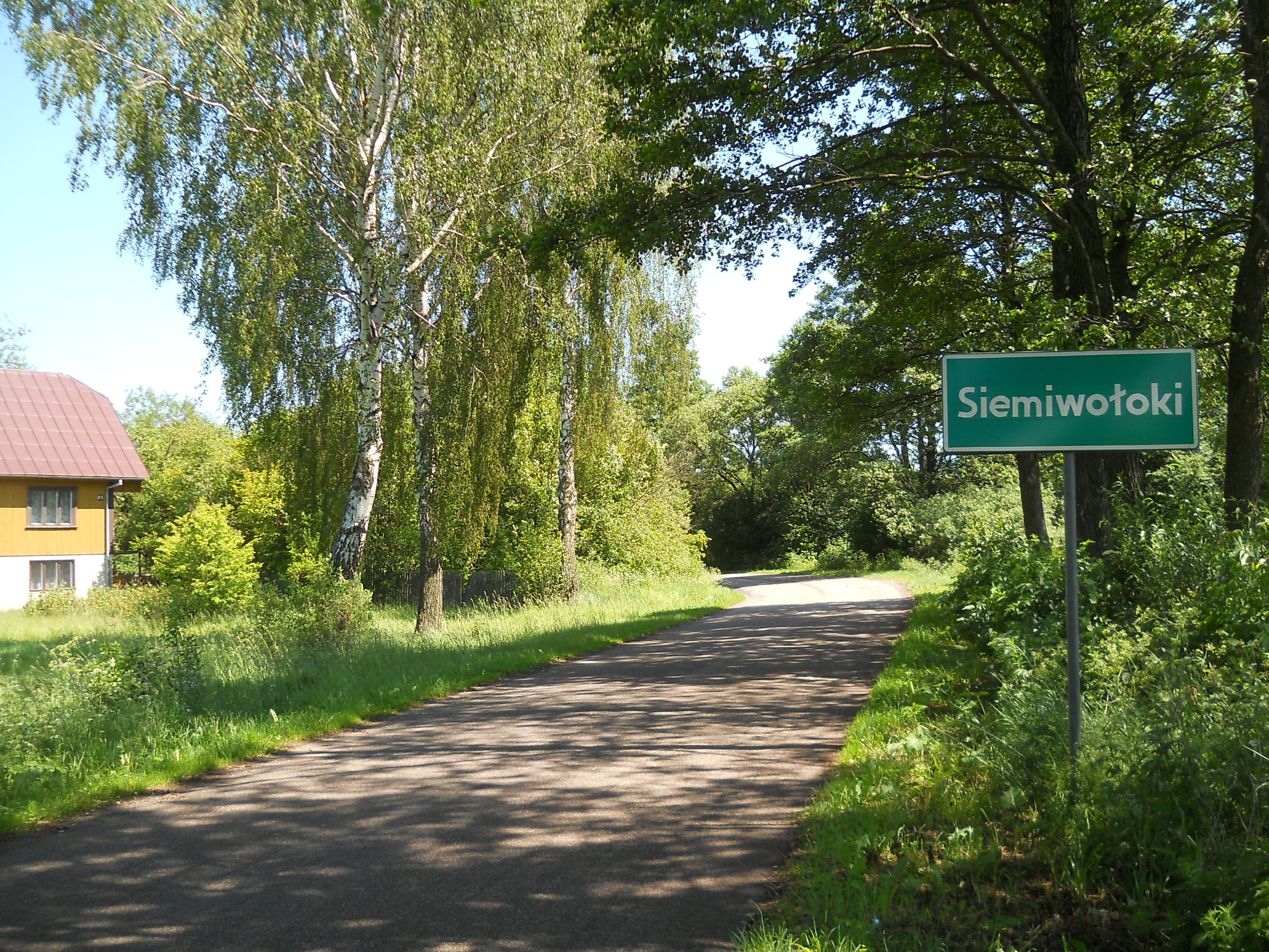 Siemiwołoki